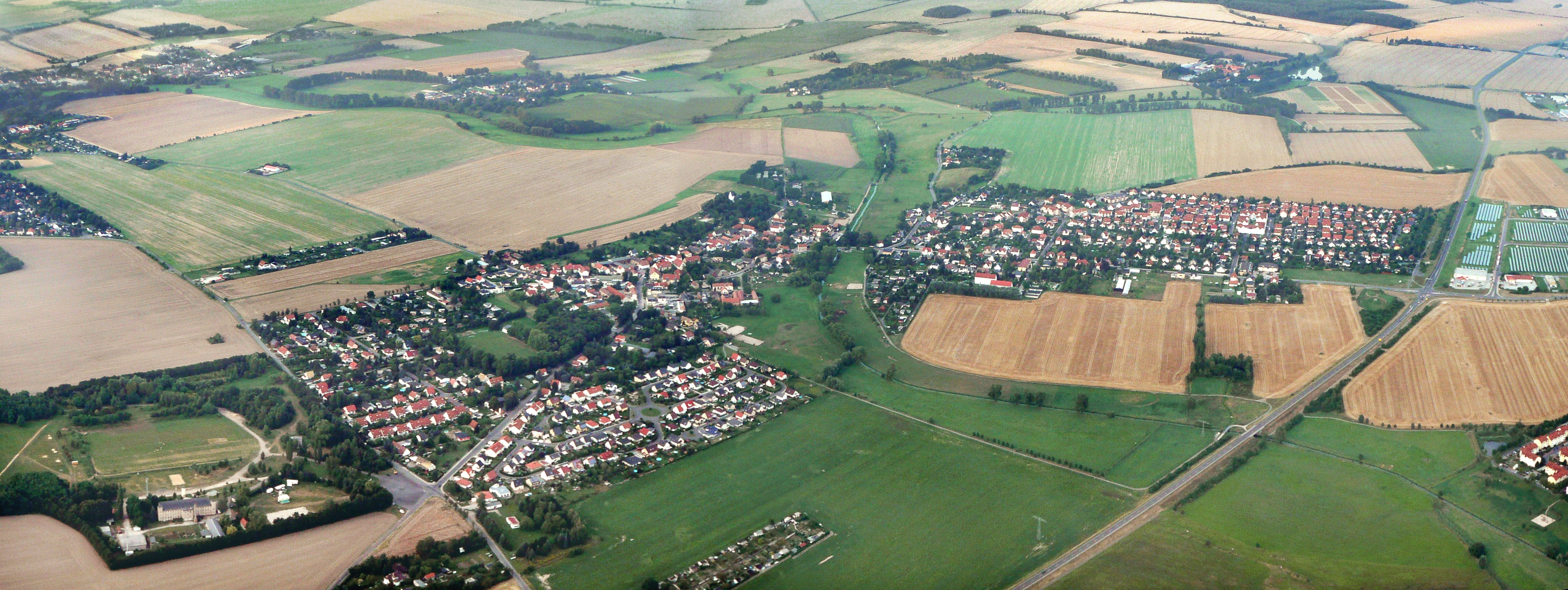 Panitzsch bei Leipzig aus der Luft. Gesehen von Südwesten